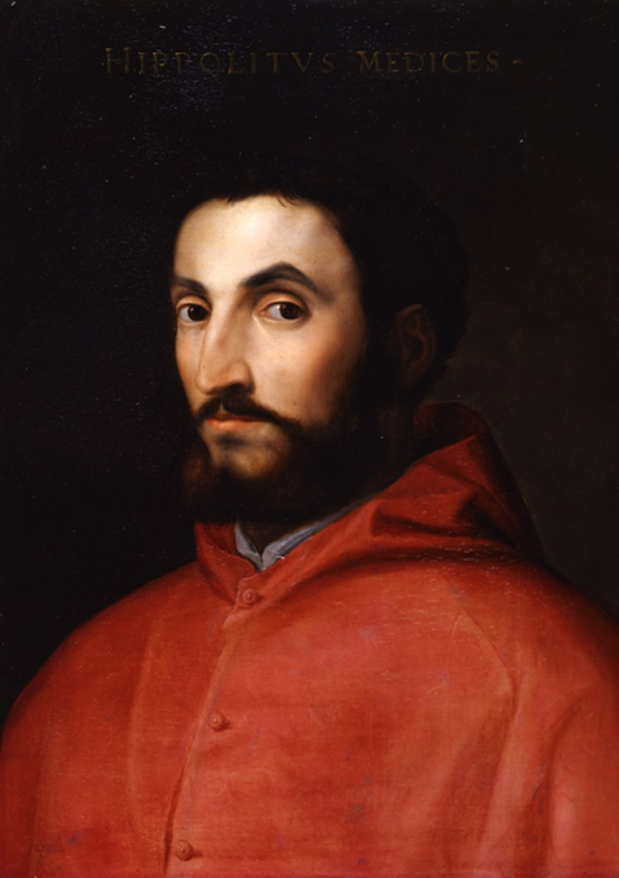 Cardinal Ippolito de' Medici